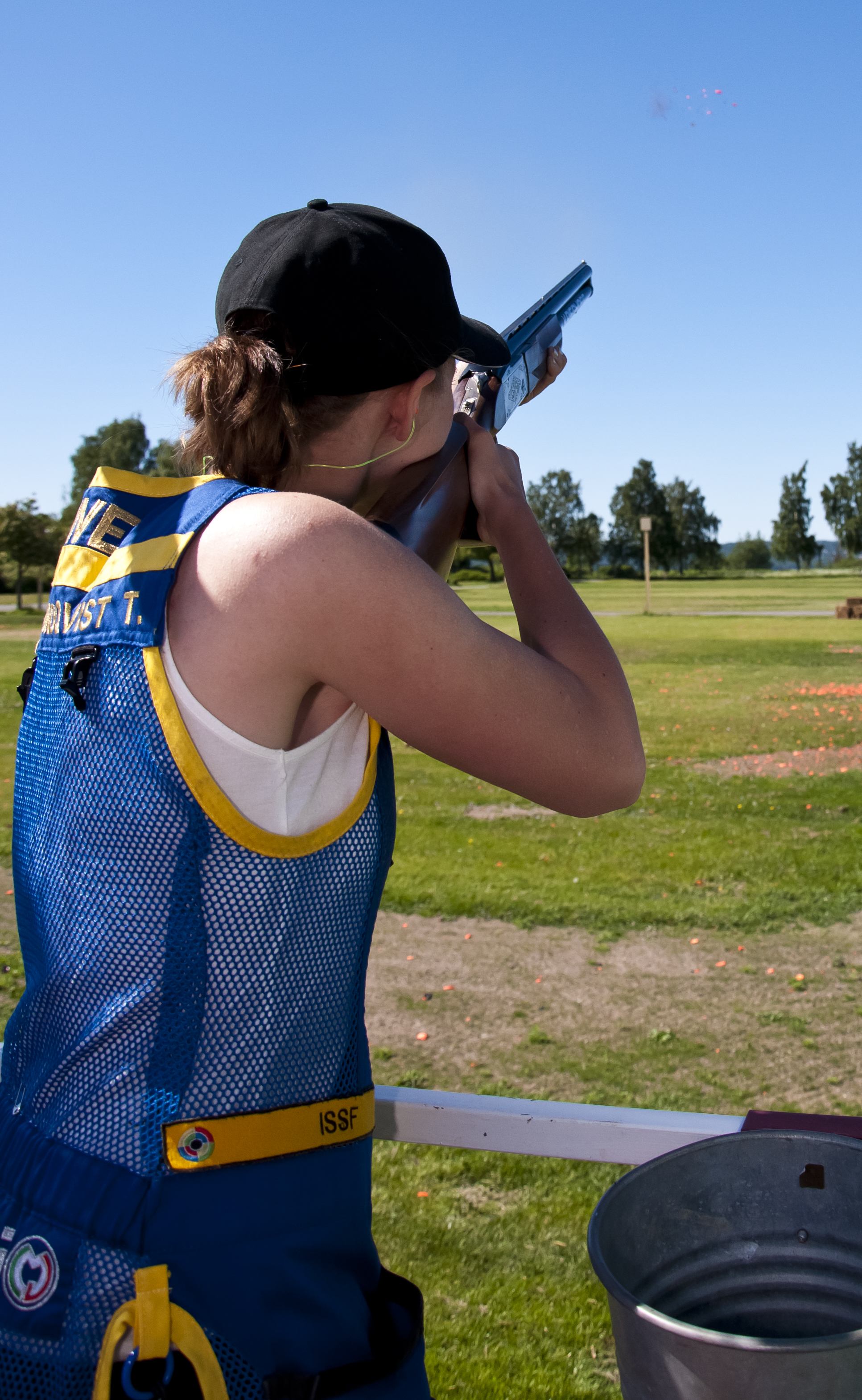 Therese Lundqvist tränar skytte på Elmiamässan 2011.